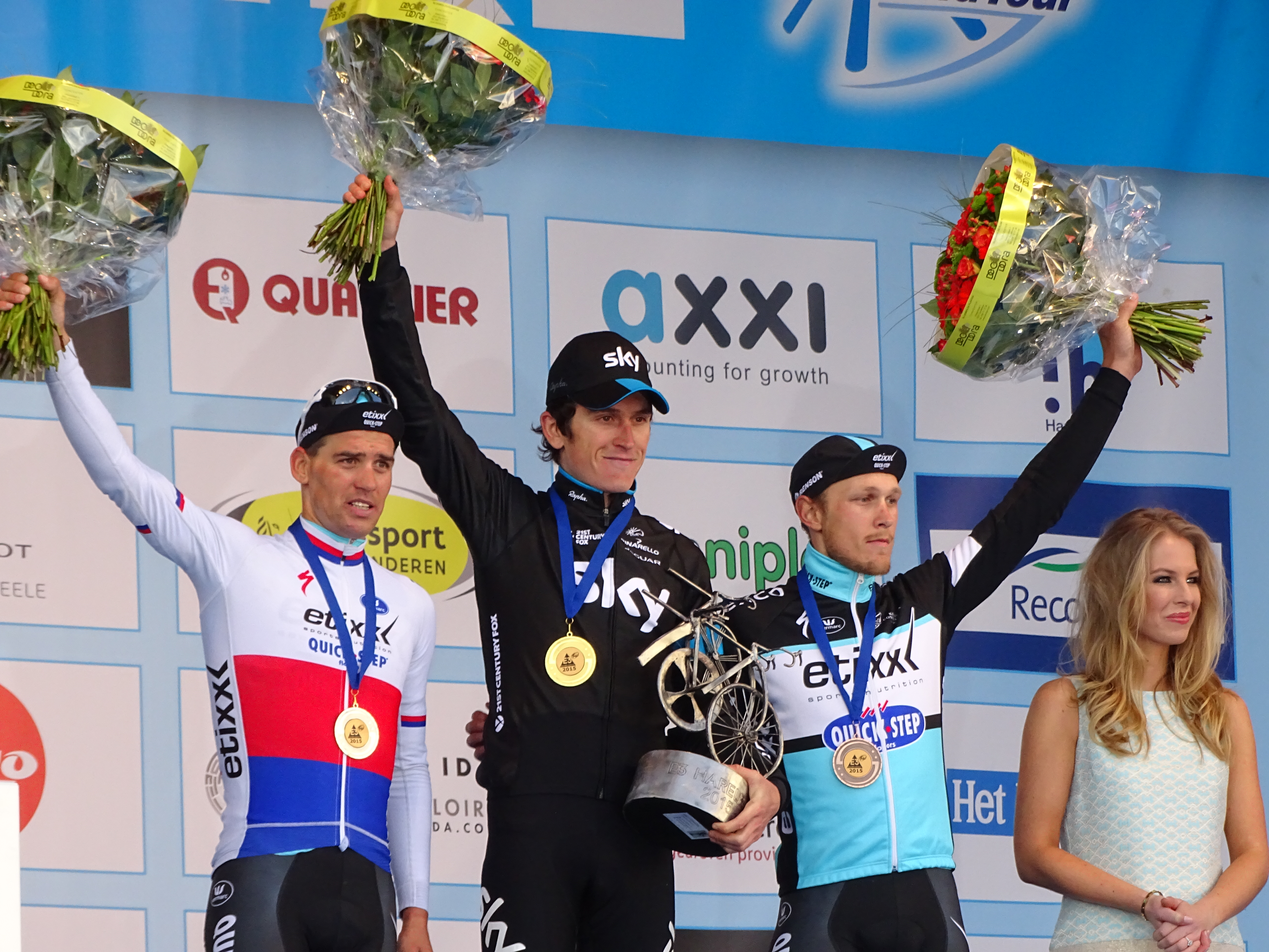 Reportage réalisé le vendredi 27 mars à l'occasion du départ et de l'arrivée du Grand Prix E3 2015 à Harelbeke, Belgique.